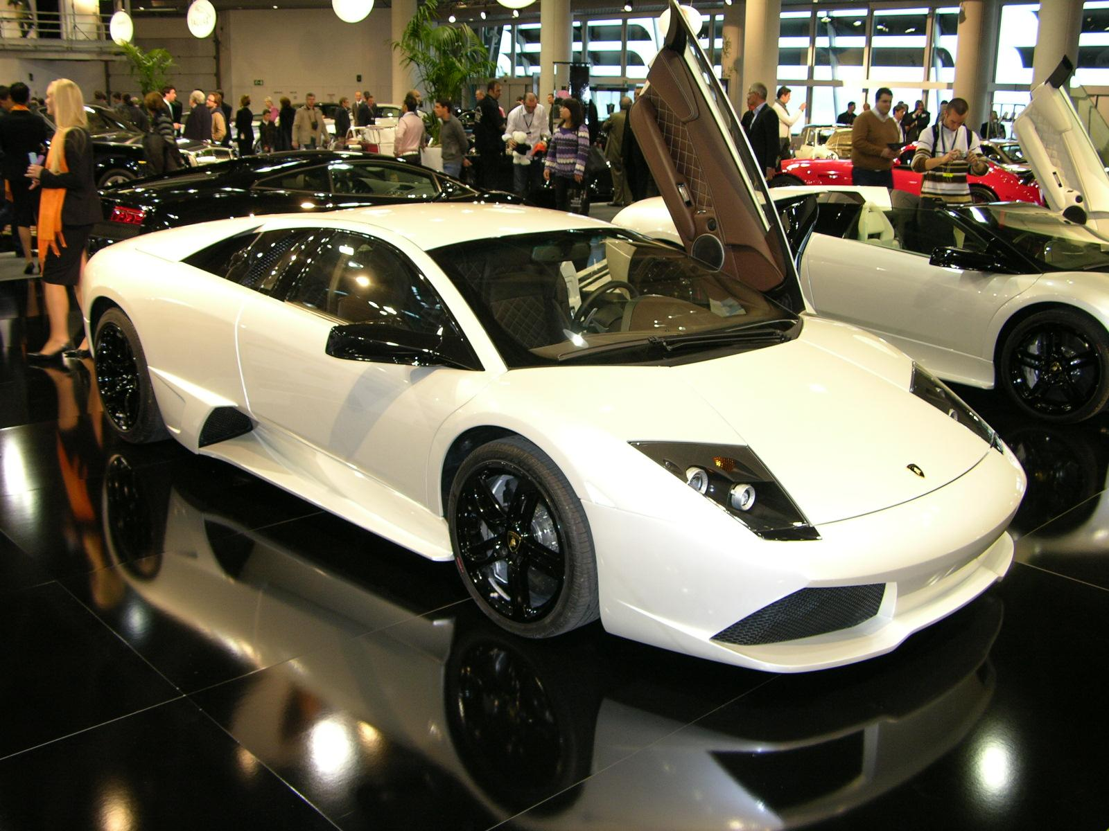 Lamborghini Murcielago